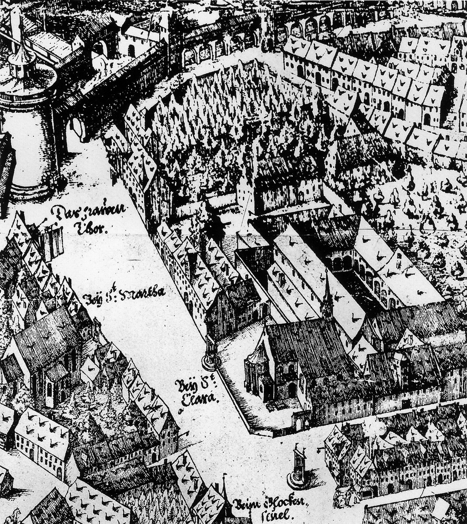 Ausschnitt aus dem Prospekt der Reichsstadt Nürnberg von Hieronymus Braun aus dem Jahr 1608. Klarissenkloster und Kirche St. Klara